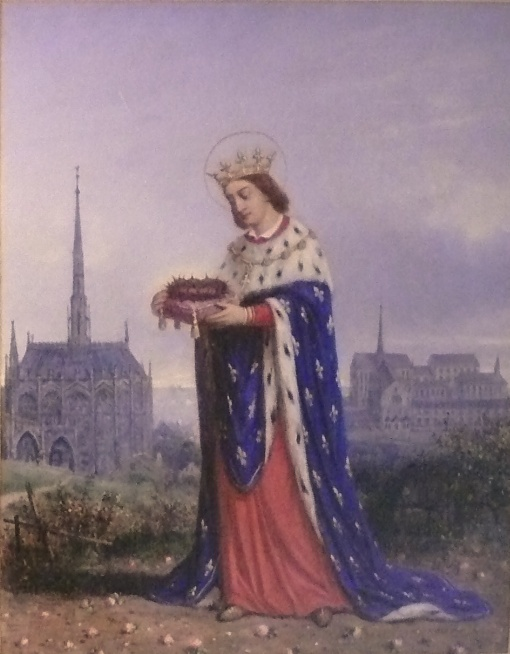 Louis IX de France